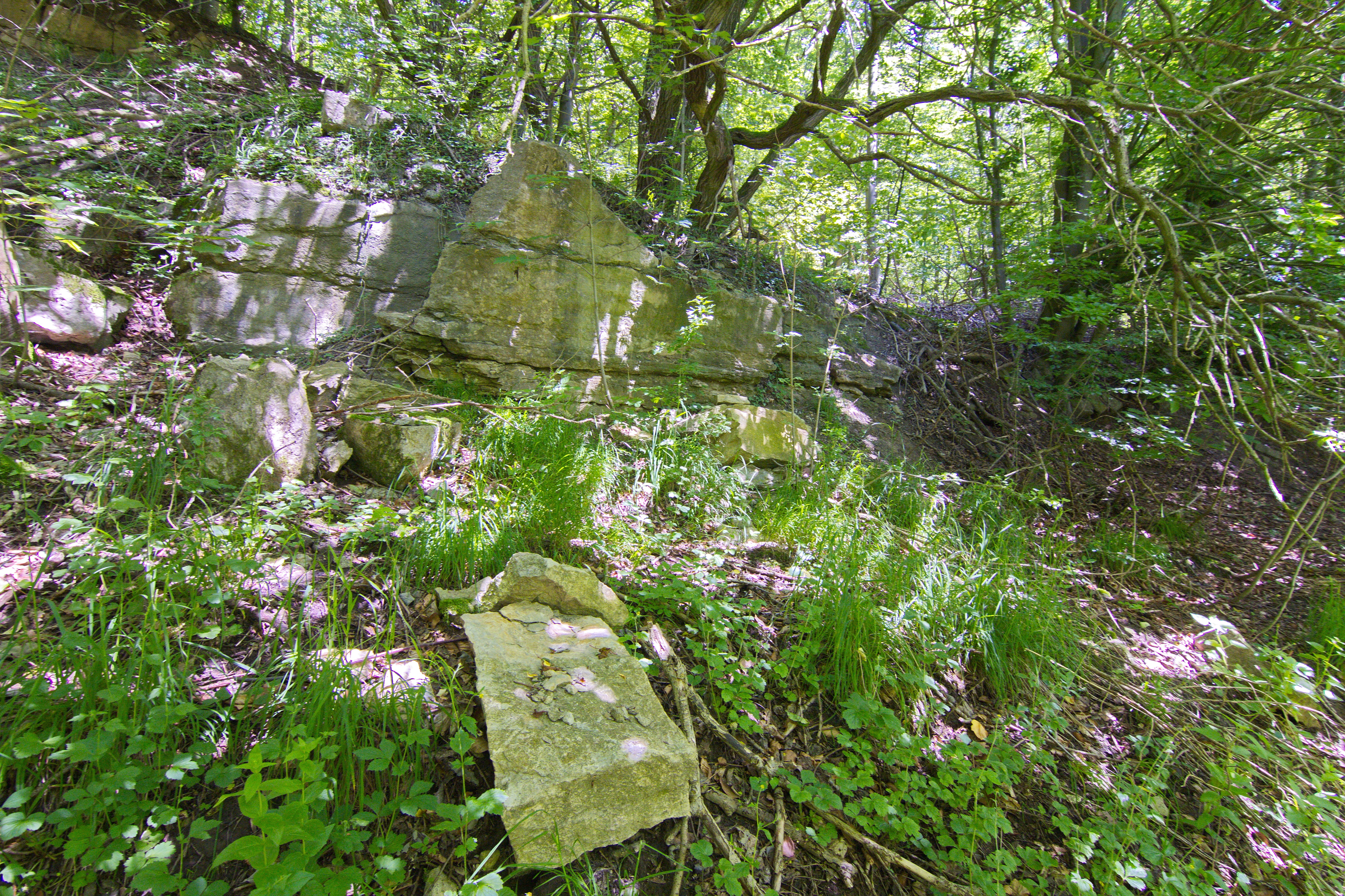 Landschaftsschutzgebiet Süntel, Niedersachsen, Deutschland